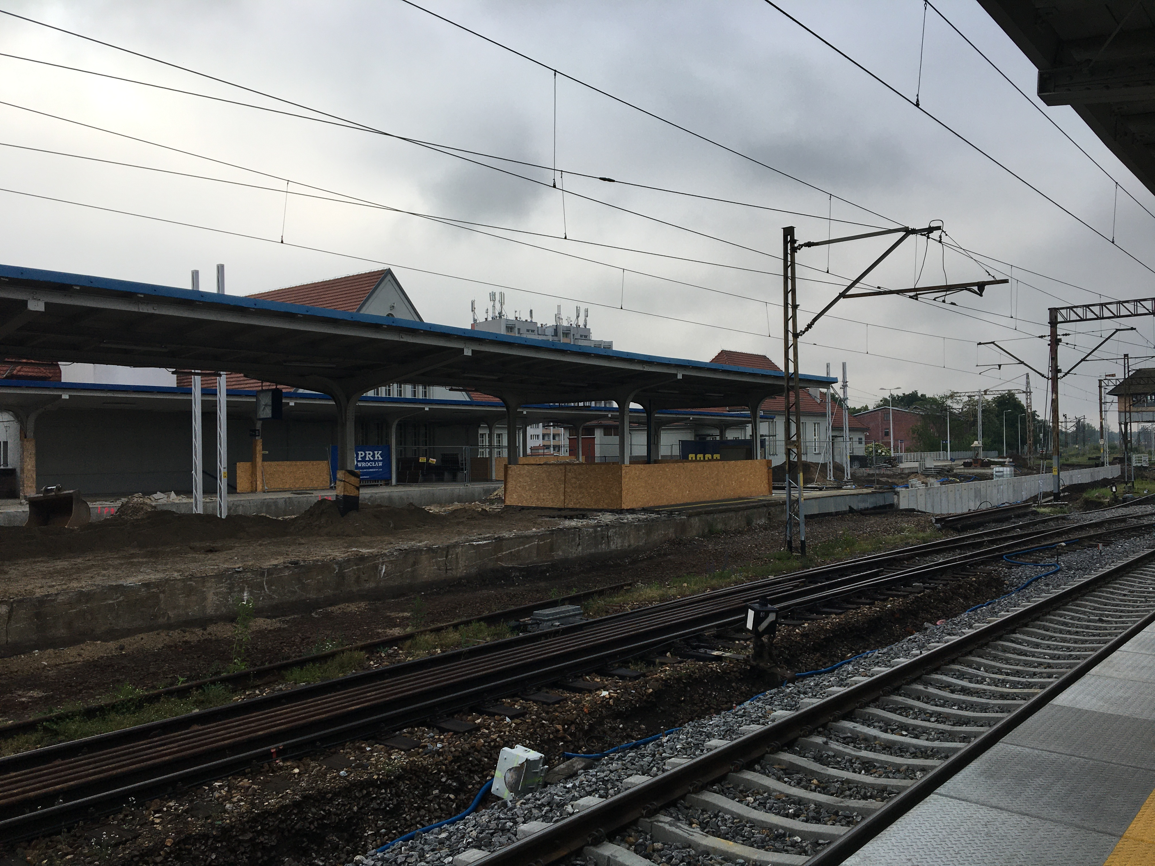 Perony stacji Kędzierzyn-Koźle podczas remontu generalnego w 2020 roku